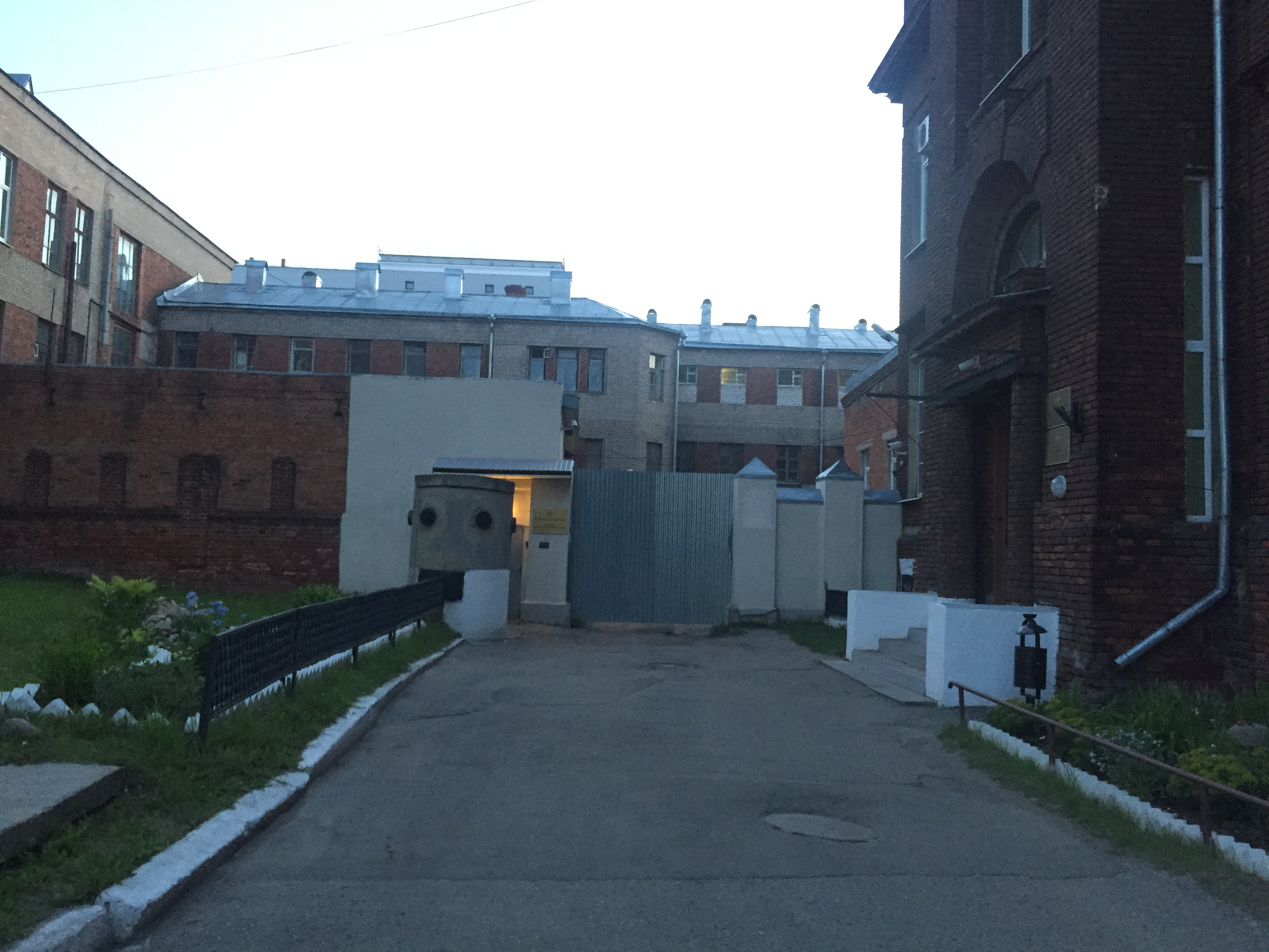 Изолятор временного содержания подозреваемых в г. Иваново